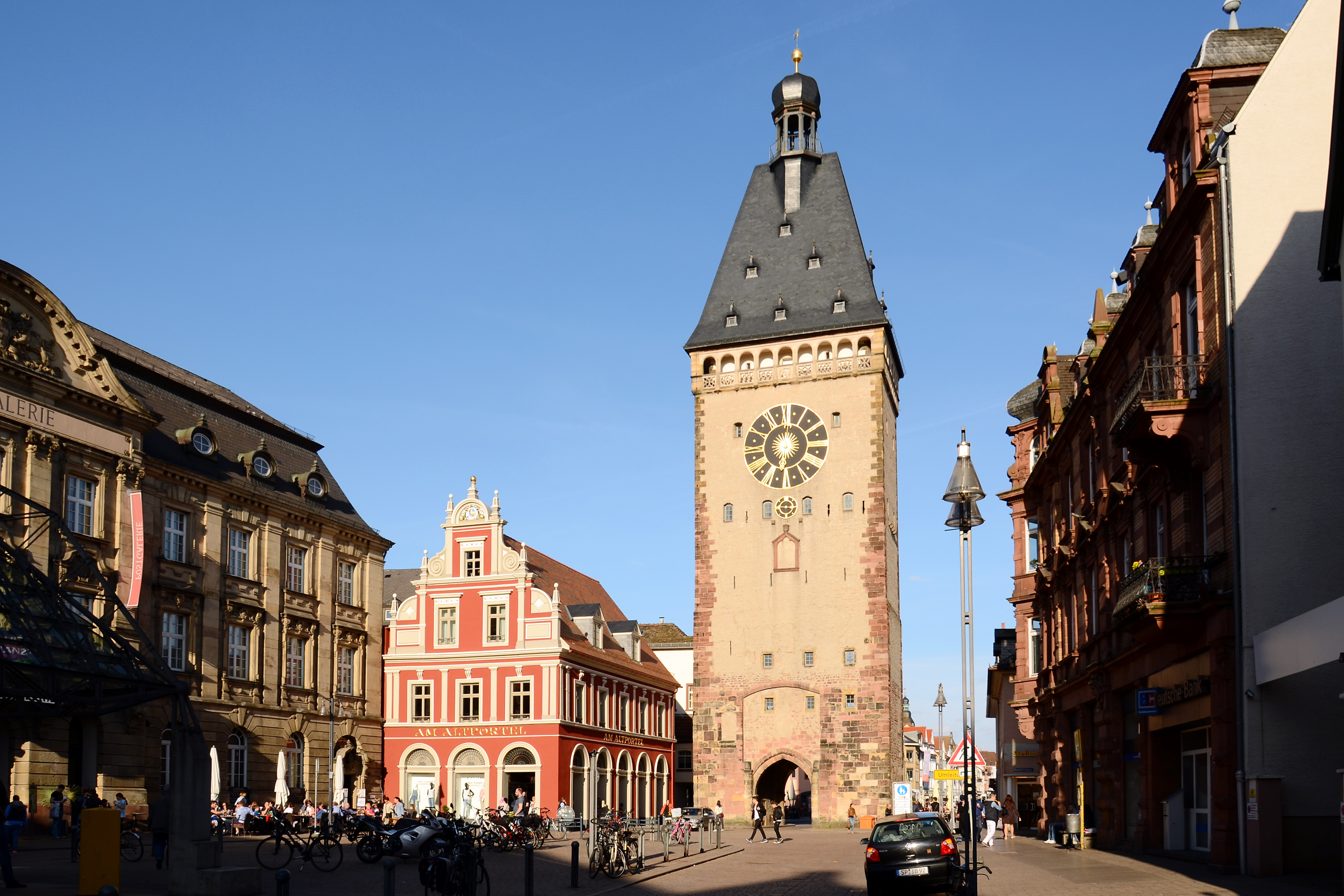 Speyer, Altpörtel von Westen